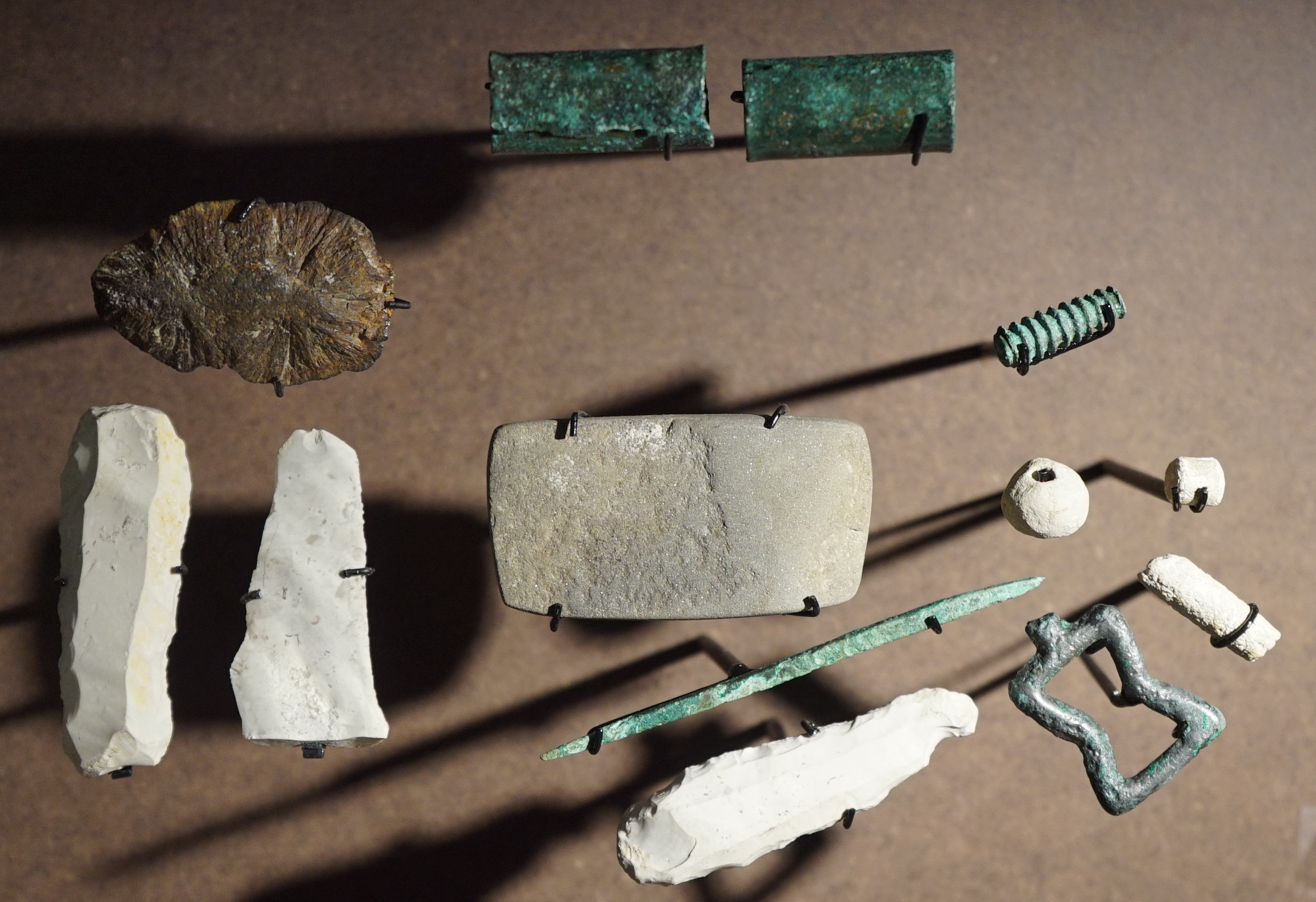 exposé à Troyes.